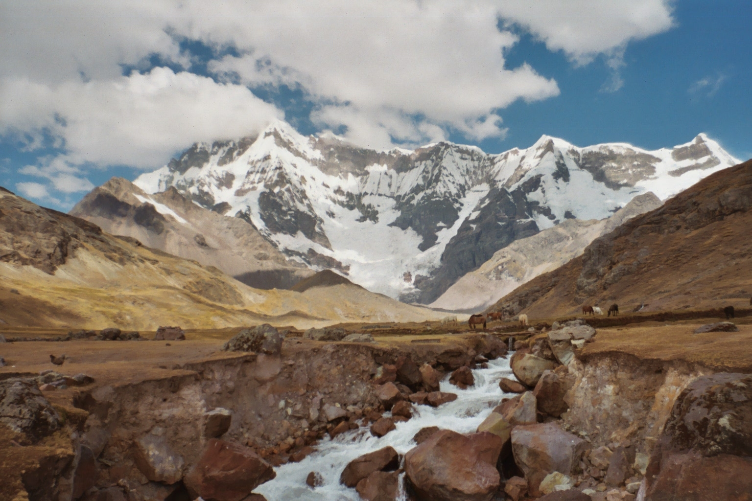 Eigen werk. Trekking 'Ausangate Circuit'. Zicht op Ausangate vanaf kampeerplaats 'Japata' (juli 2005).